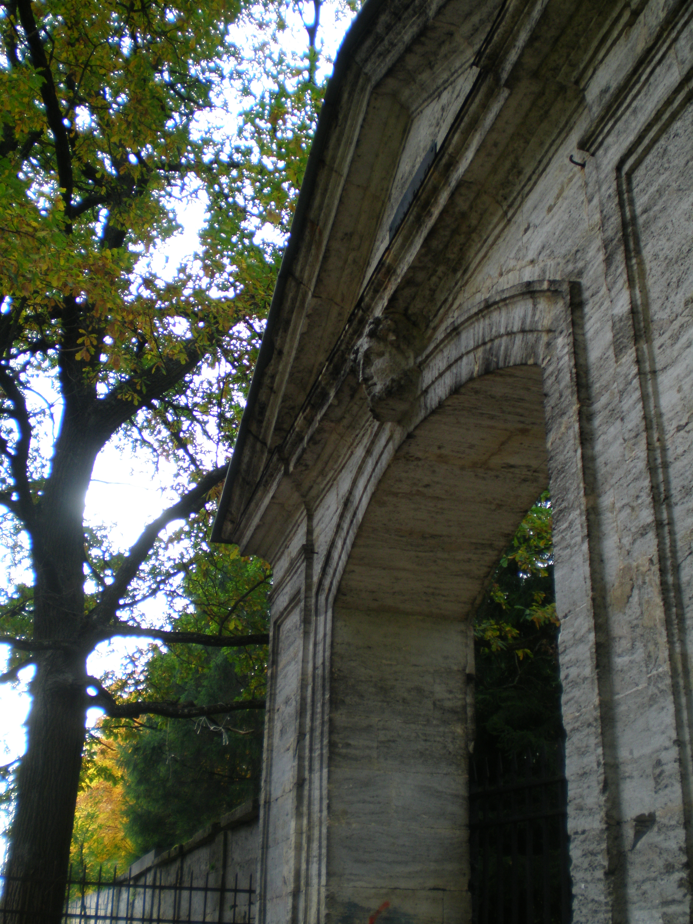 Ворота при входе в парк Сильвия